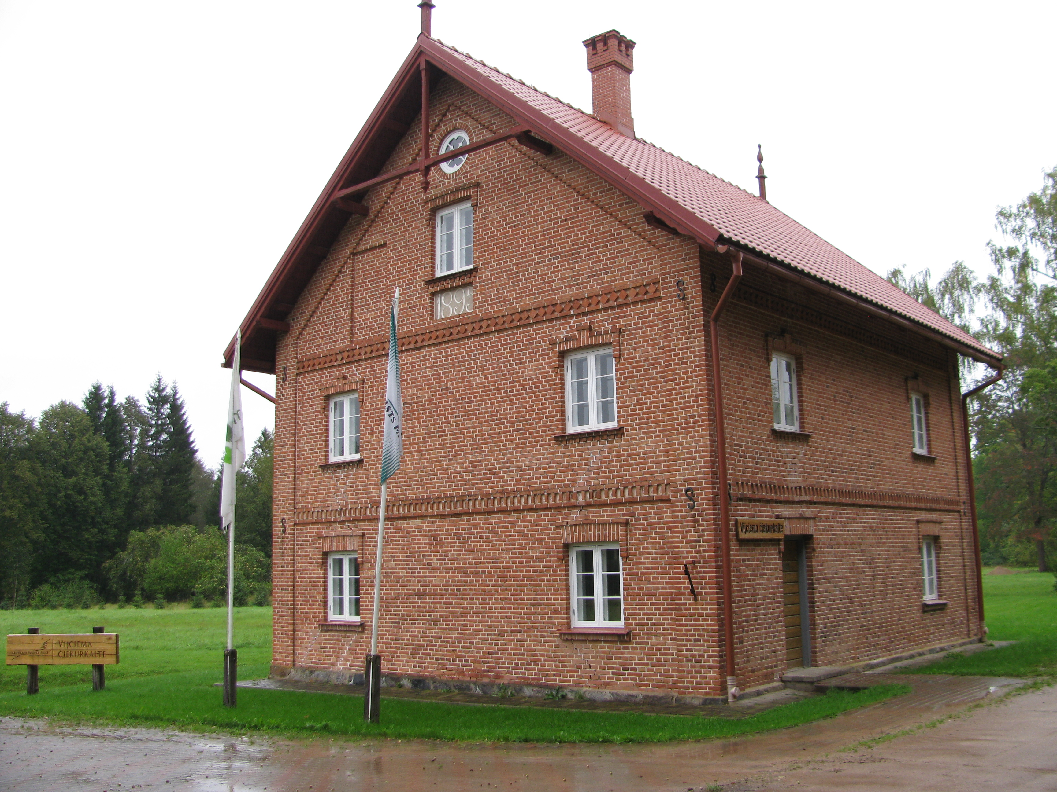 Vieta, kur no čiekuriem tiek iegūtas sēklas jaunu mežu sēšanai.